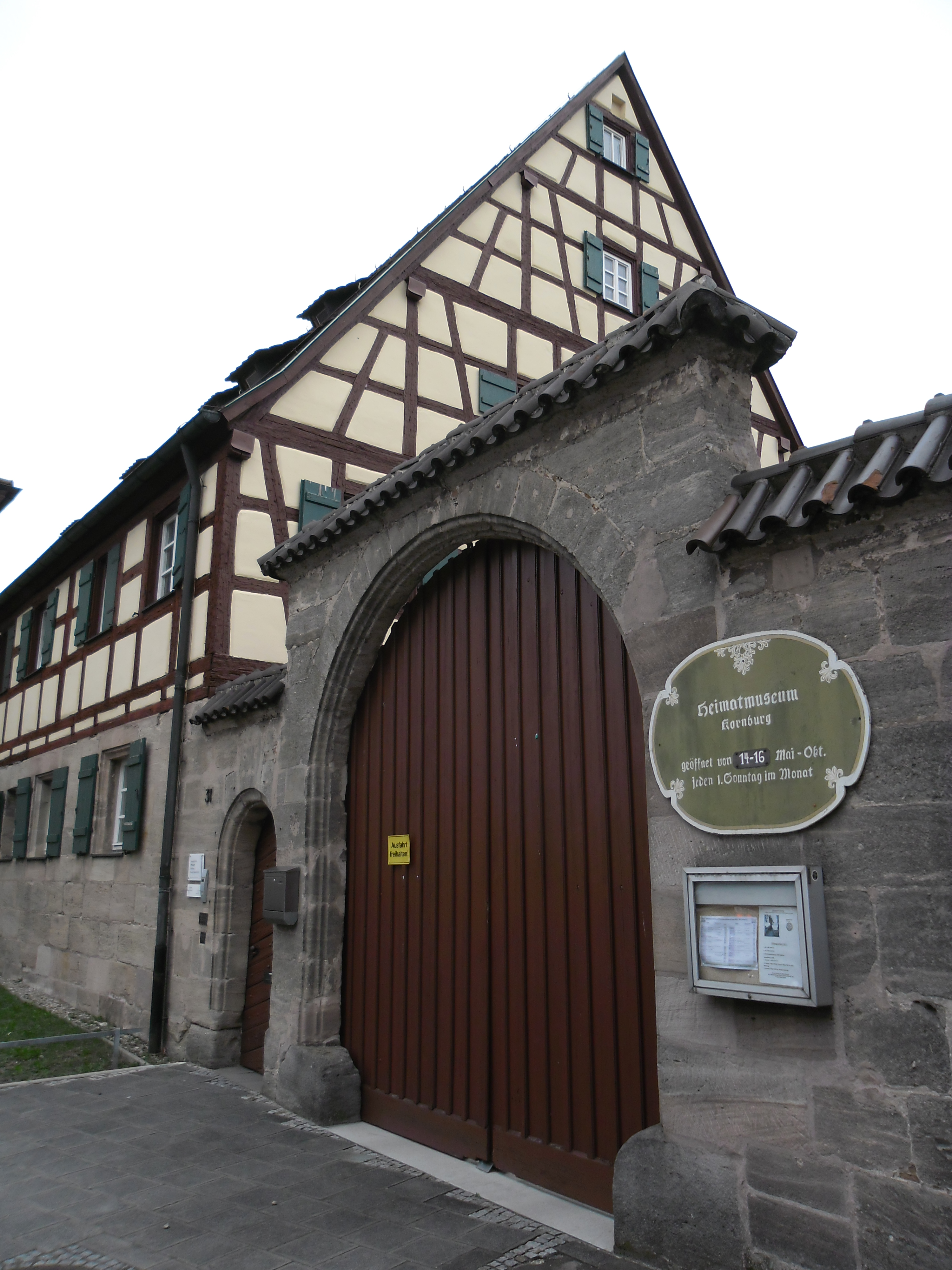 siehe Bildtitel